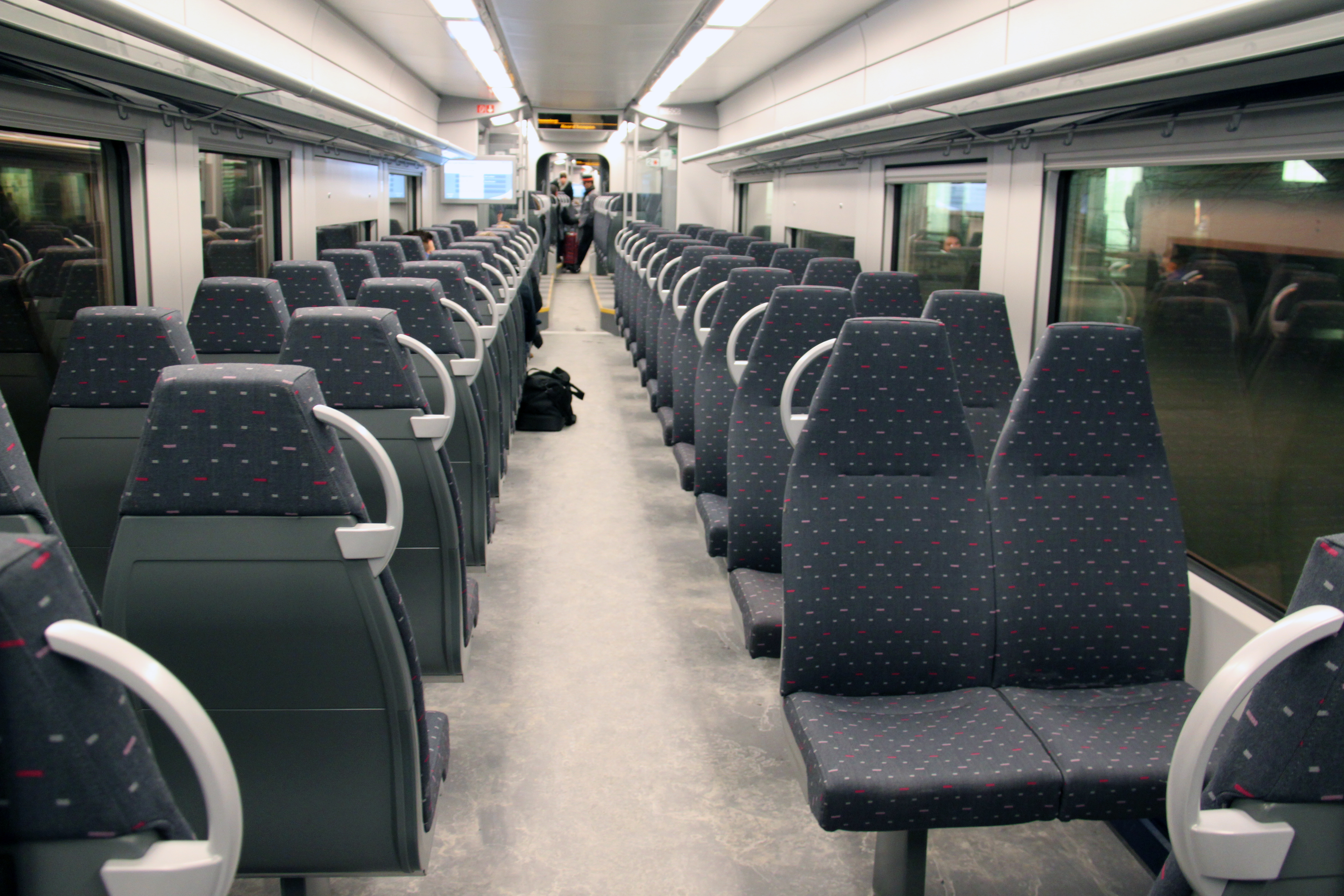 Interieur van de NMBS MS08.